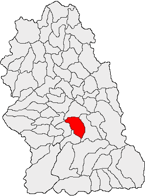 Categorie:Hărţi ale judeţului Hunedoara